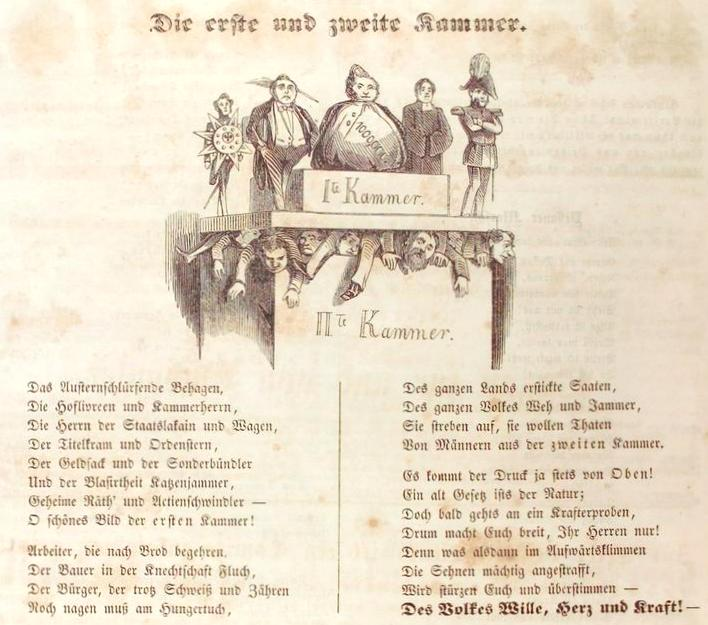 Kladderadatsch, 1849. Erste und Zweite Kammer in Preußen.